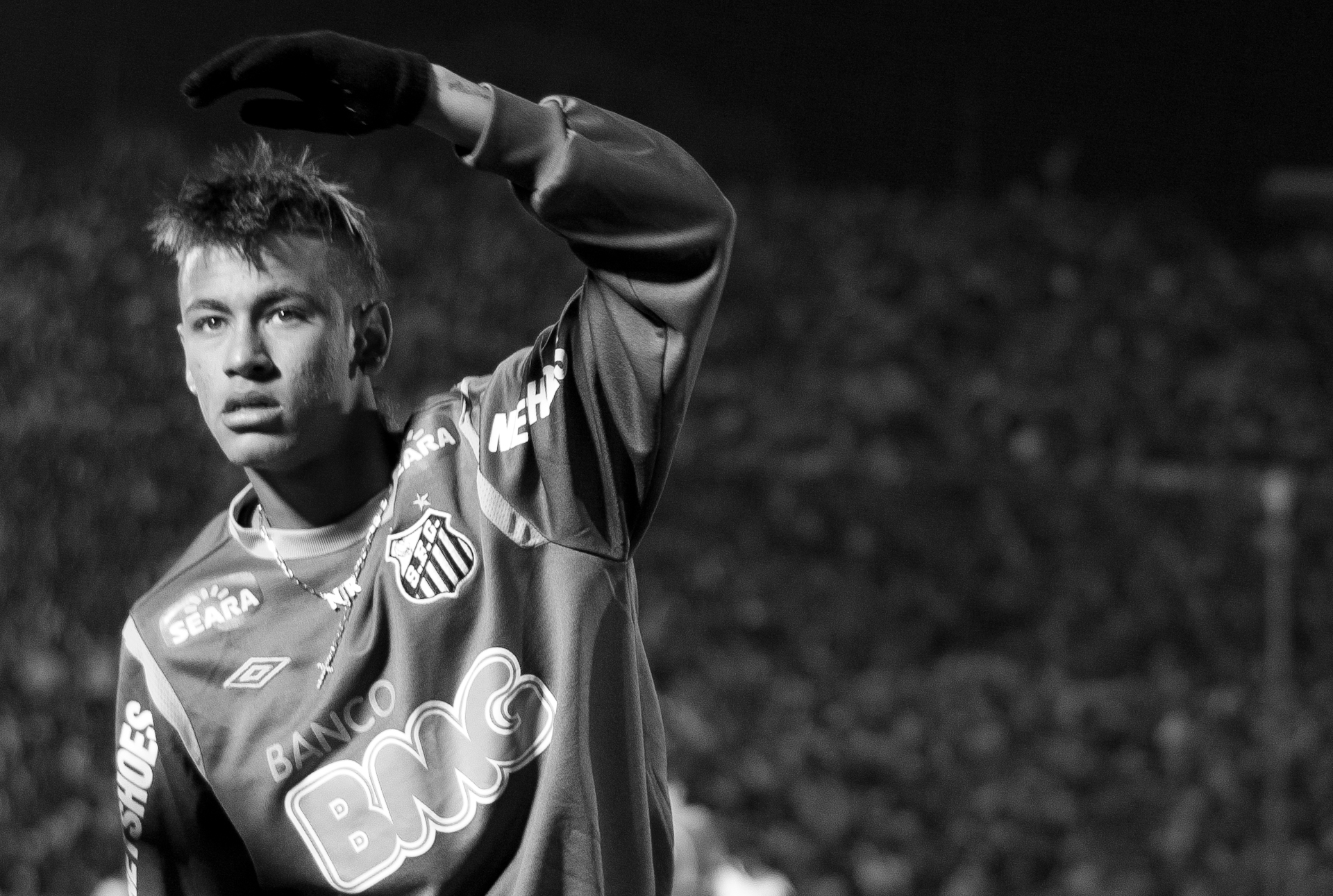 Peñarol: Sebastián Sosa; Alejandro González, Carlos Valdez, Guillermo Rodríguez, Darío Rodríguez; Matías Corujo (m.67 Antonio Pacheco), Luis Aguiar, Nicolás Freitas, Matias Mier (m.55 Fabian Estoyanoff); Alejandro Martinuccio y Juan Manuel Olivera (m.82 Diego Alonso). Entrenador: Diego Aguirre. Santos: Rafael; Pará, Bruno Rodrigo, Durval, Alex Sandro; Adriano, Danilo, Arouca, Elano (m.78 Alan Patrick); Neymar y Zé Eduardo (m.89 Bruno Aguiar). Entrenador: Muricy Ramalho. Estadio Centenario, Montevideo, Uruguay. Camera: Canon EOS 5D Mark II Lens: Zeiss Planar T* 1.4/50 ZE 0 ISO: 250 Published